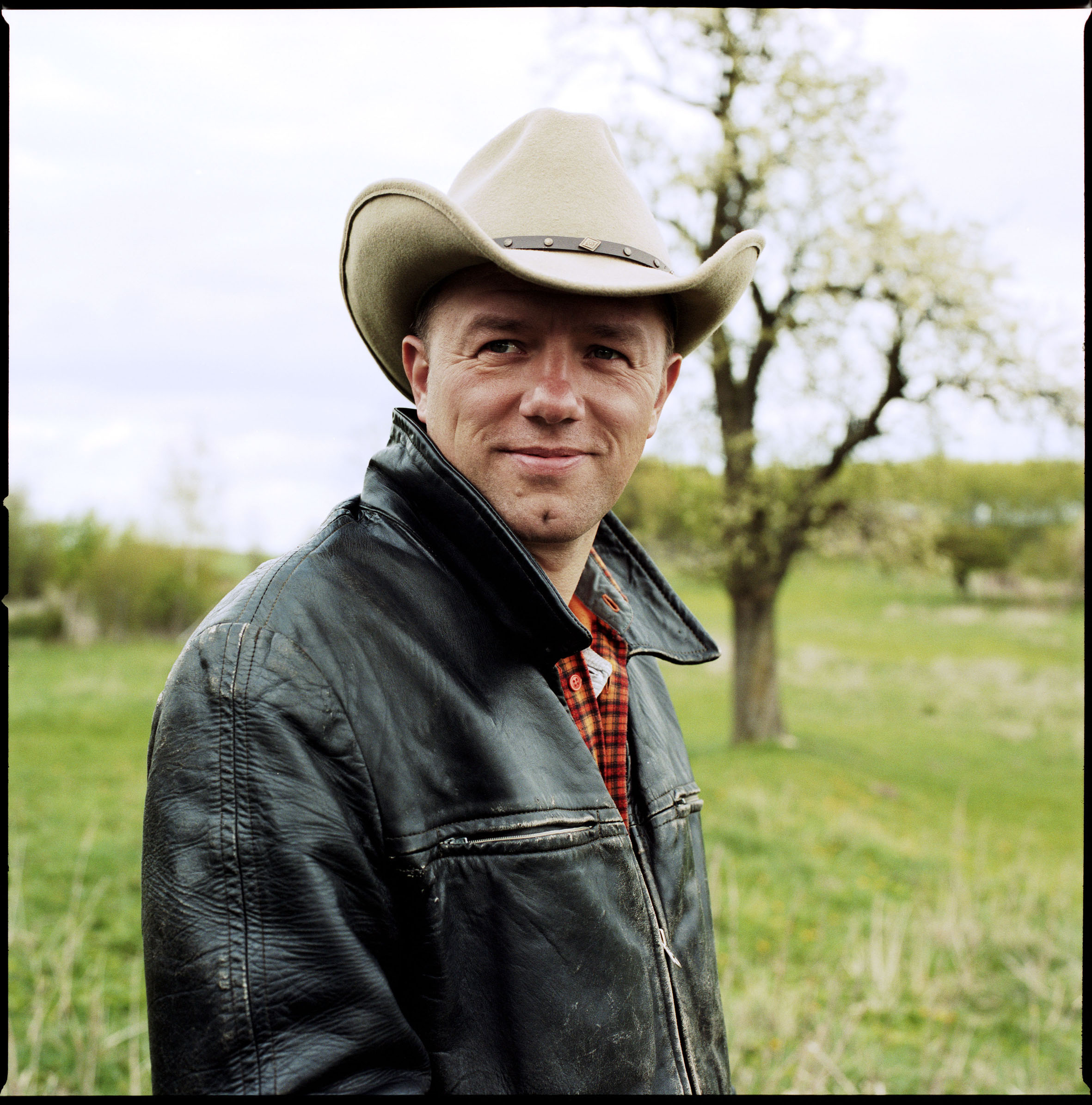 Tino Eisbrenner, ostdeutscher Musiker